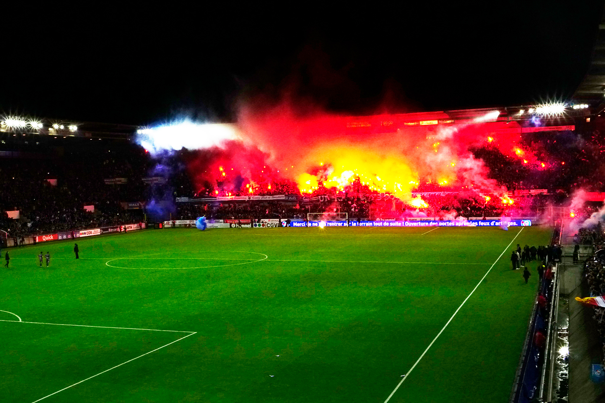 Pyrotechnische Choreographie nach dem Spiel Racing Club de Strasbourg gegen FC Bourg-Péronnas in der zweiten französischen Liga am 19. Mai 2017 im Stade de la Meinau, nachdem die Meisterschaft und damit der Aufstieg in die Ligue 1 feststand.